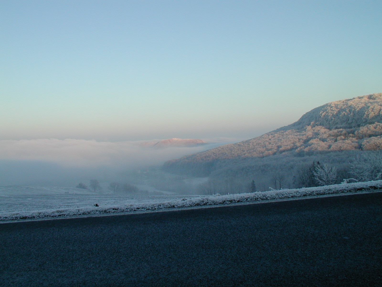 Nördlicher Ausläufer des Ohmgebirges (Die Sonder) über Holungen mit der Abraumhalde Bischofferode (Bildmitte)